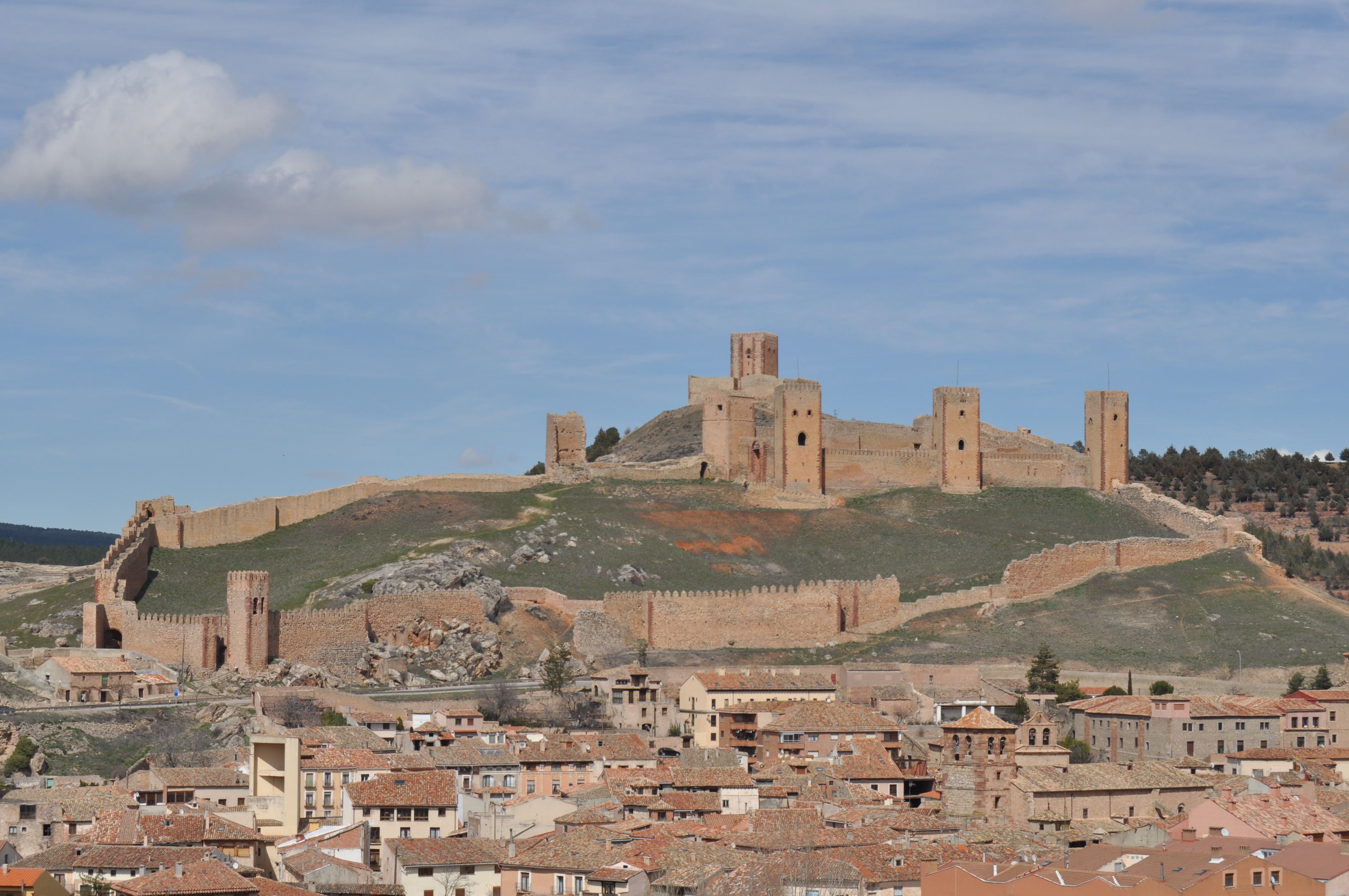 Molina de Aragon - 086